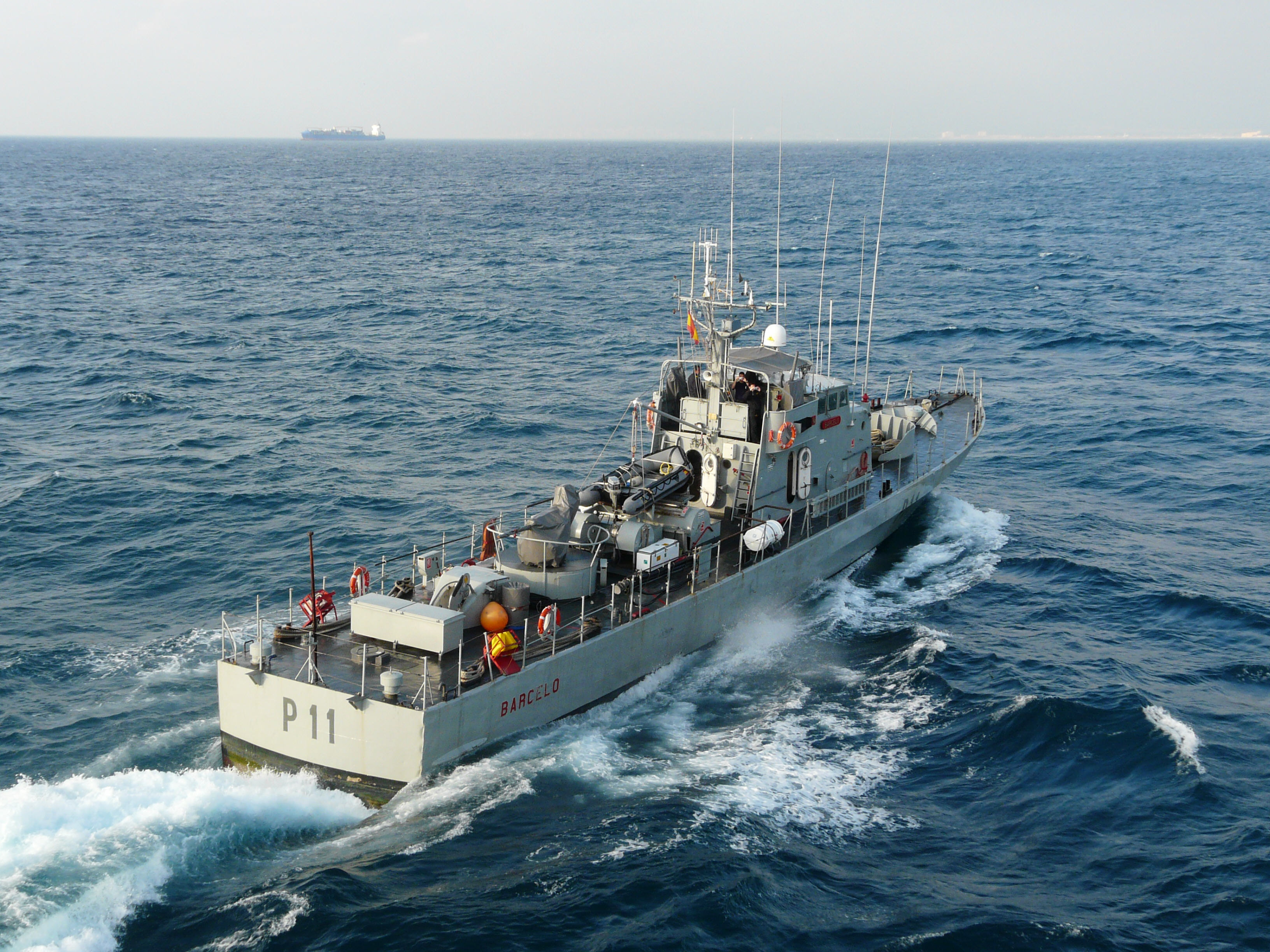 Patrullero rapido de la Armada Española Barcelo (P-11)